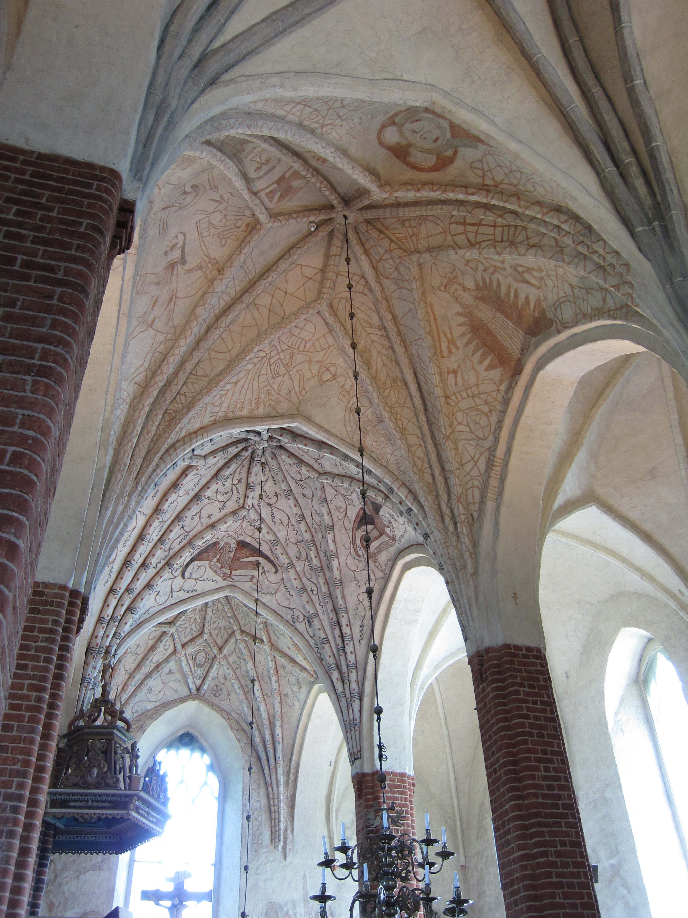 Pyhtään kirkon sisätiloja.